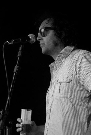 Imagen de Max Capote en evento Top Line Summer, en la rambla de Montevideo.